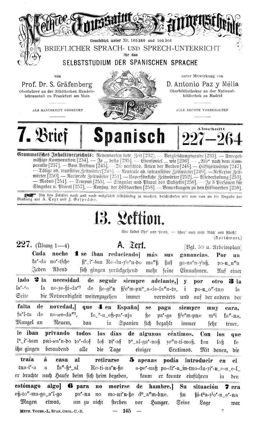 Methode Toussaint-Langenscheidt, Brieflicher Sprach- und Sprech-Unterricht für das Studium der Spanischen Sprache; 7. Brief, Abschnitt 117-732, 13. Lektion; Titelblatt.